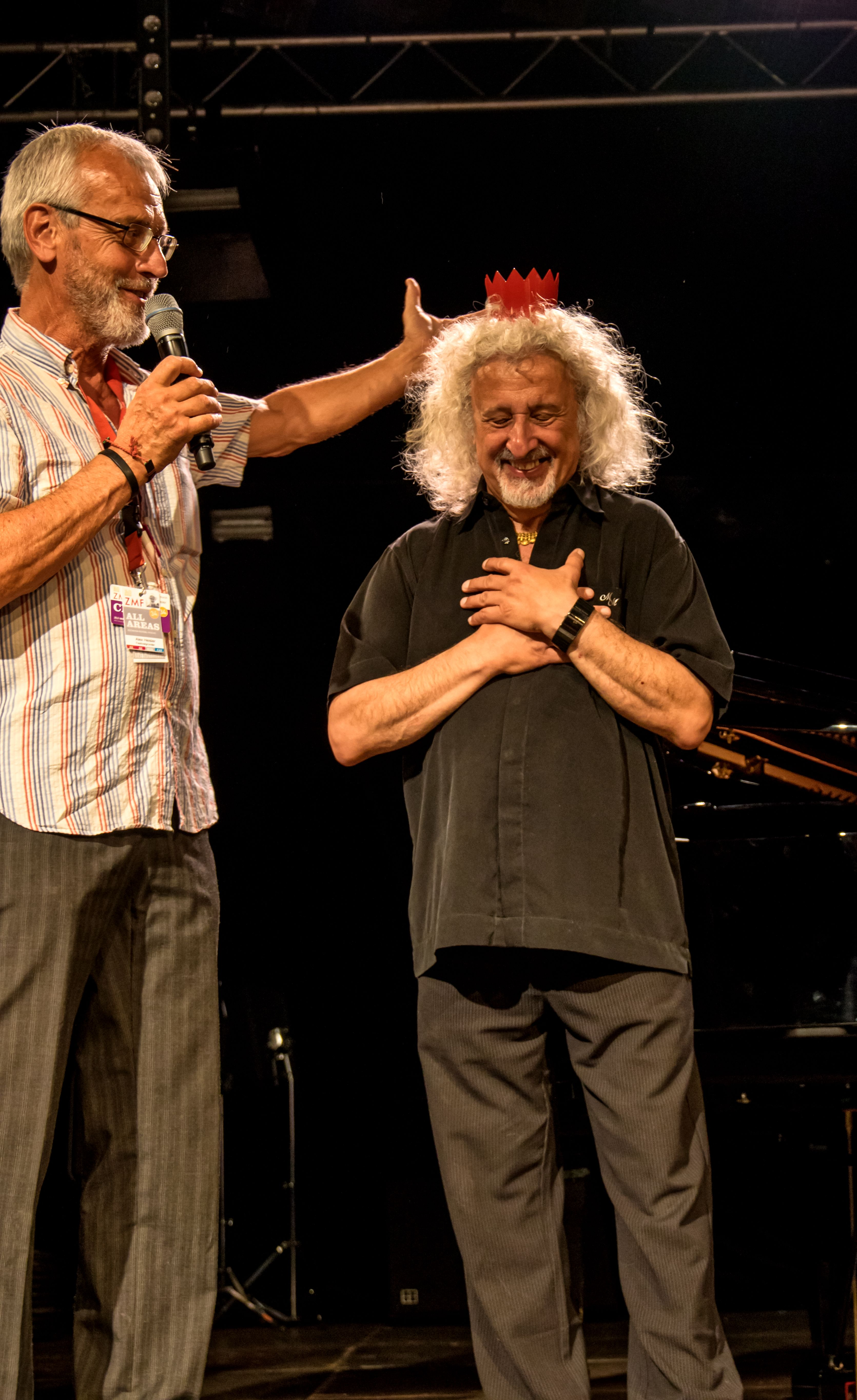 Bilder vom Zelt Musik Festival 2016 in Freiburg im Breisgau Die Preisverleihung uf der Gala